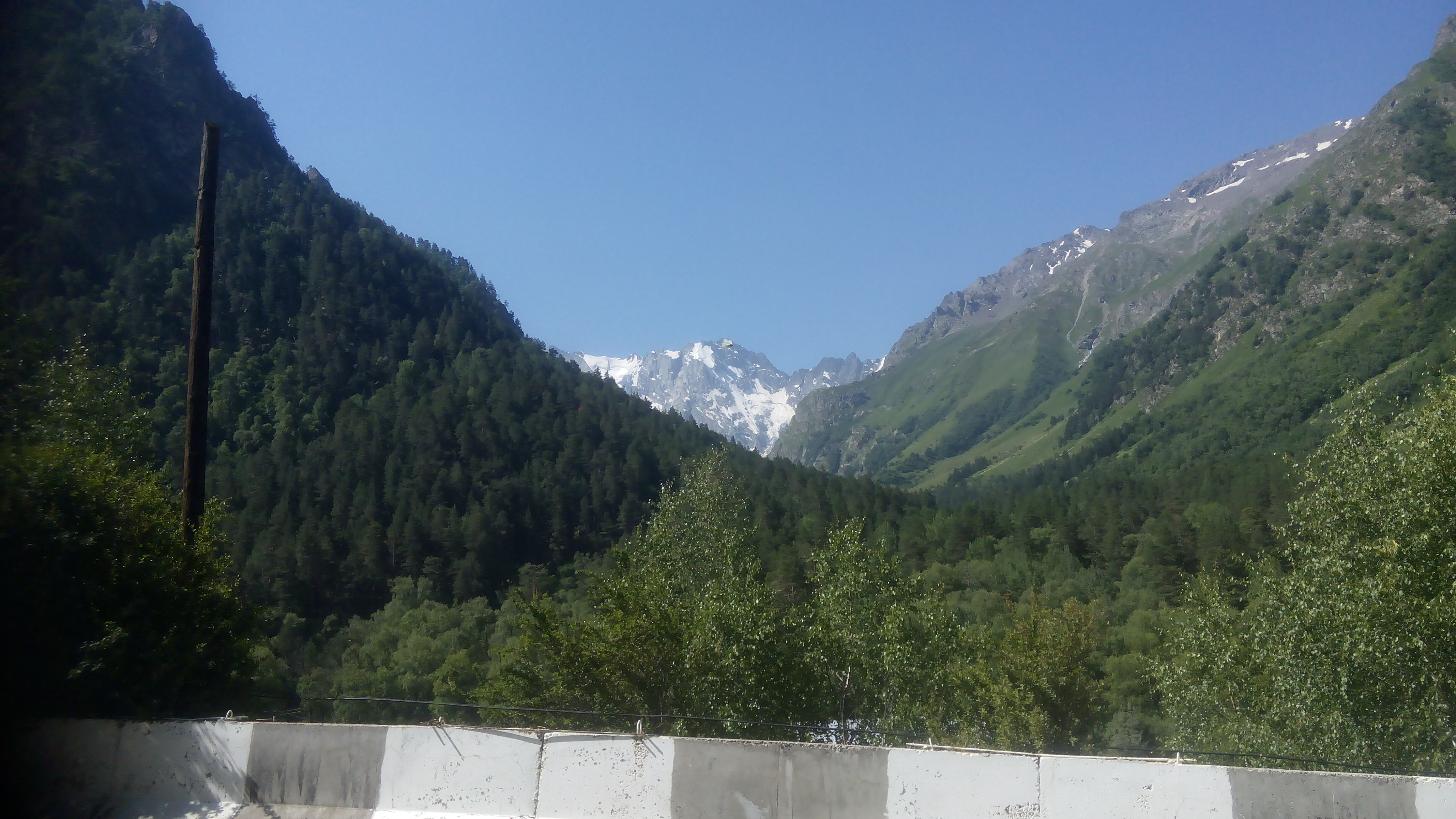 г. Шхельда западная